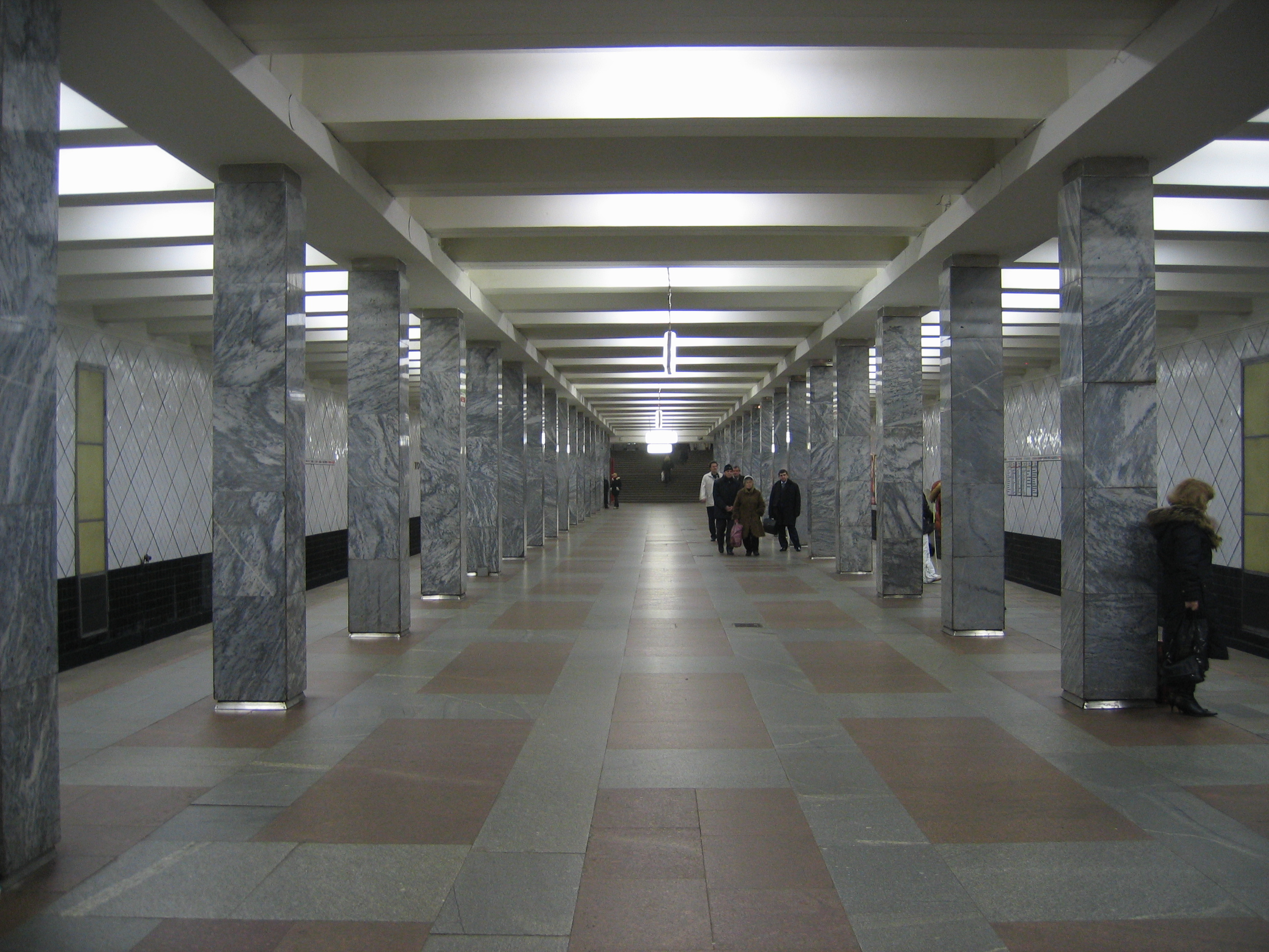 Московский метрополитен. Станция Профсоюзная